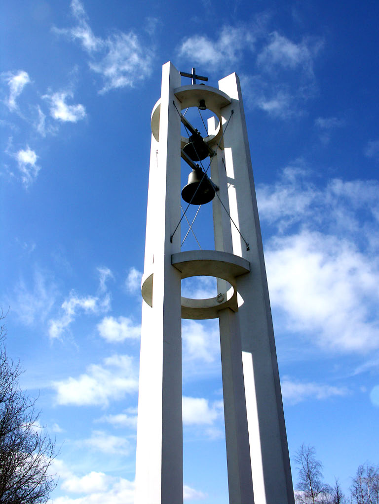 Klockstapel vid Rosengårdskyrkan i Helsingborg